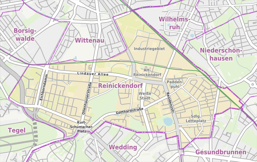 Übersichtskarte der Straßen und Ortslagen in Berlin-Reinickendorf